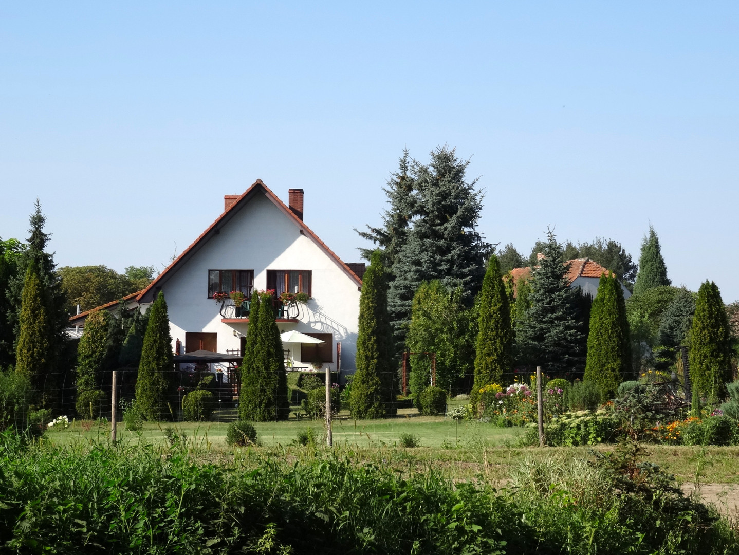 Pień, gmina Dąbrowa Chełmińska